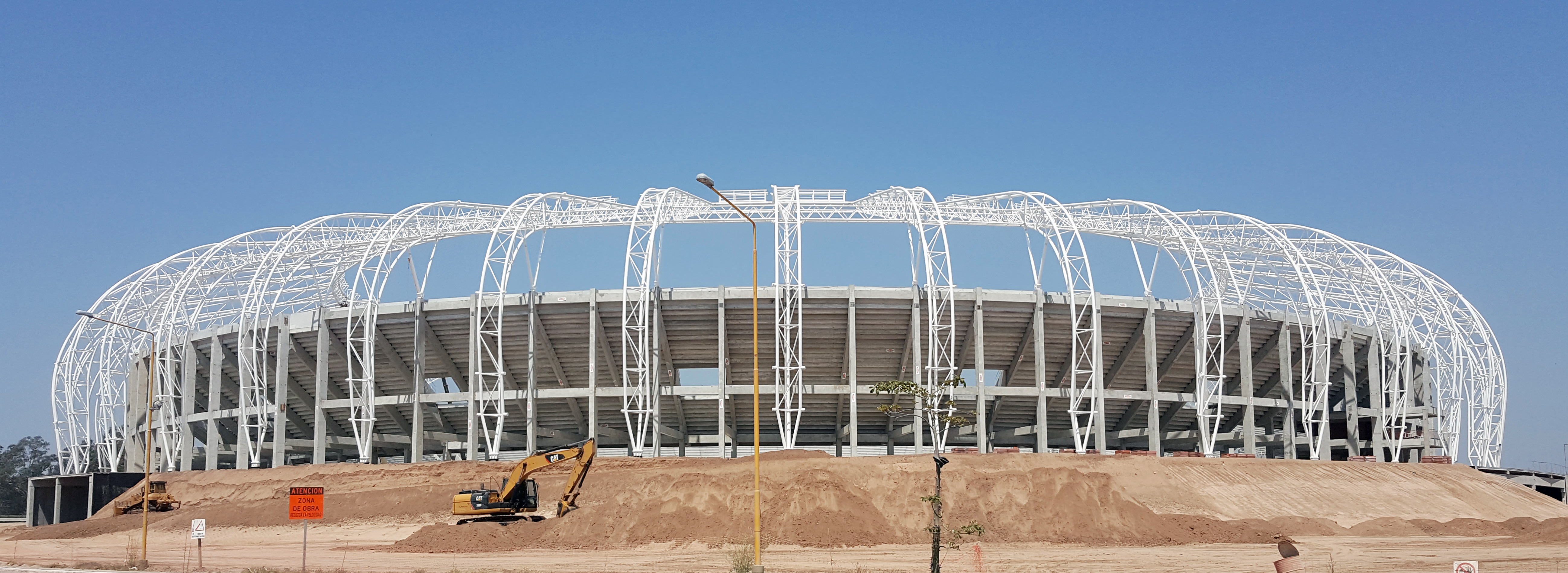 Estadio Único de Santiago del Estero en fase de construcción (septiembre de 2019).